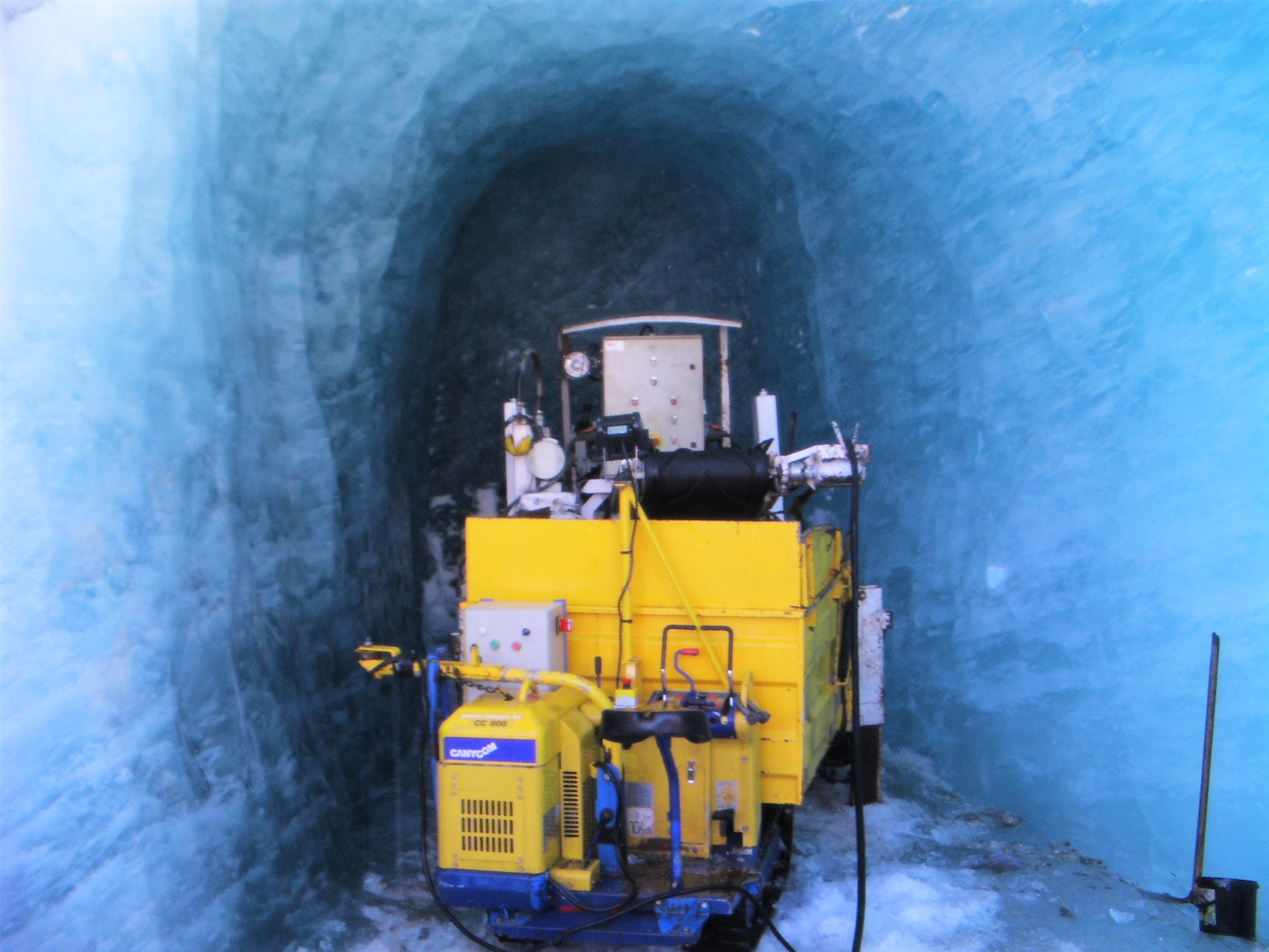 Machine qui sert à creuser de nouveaux tunnels dans la mer de glace.